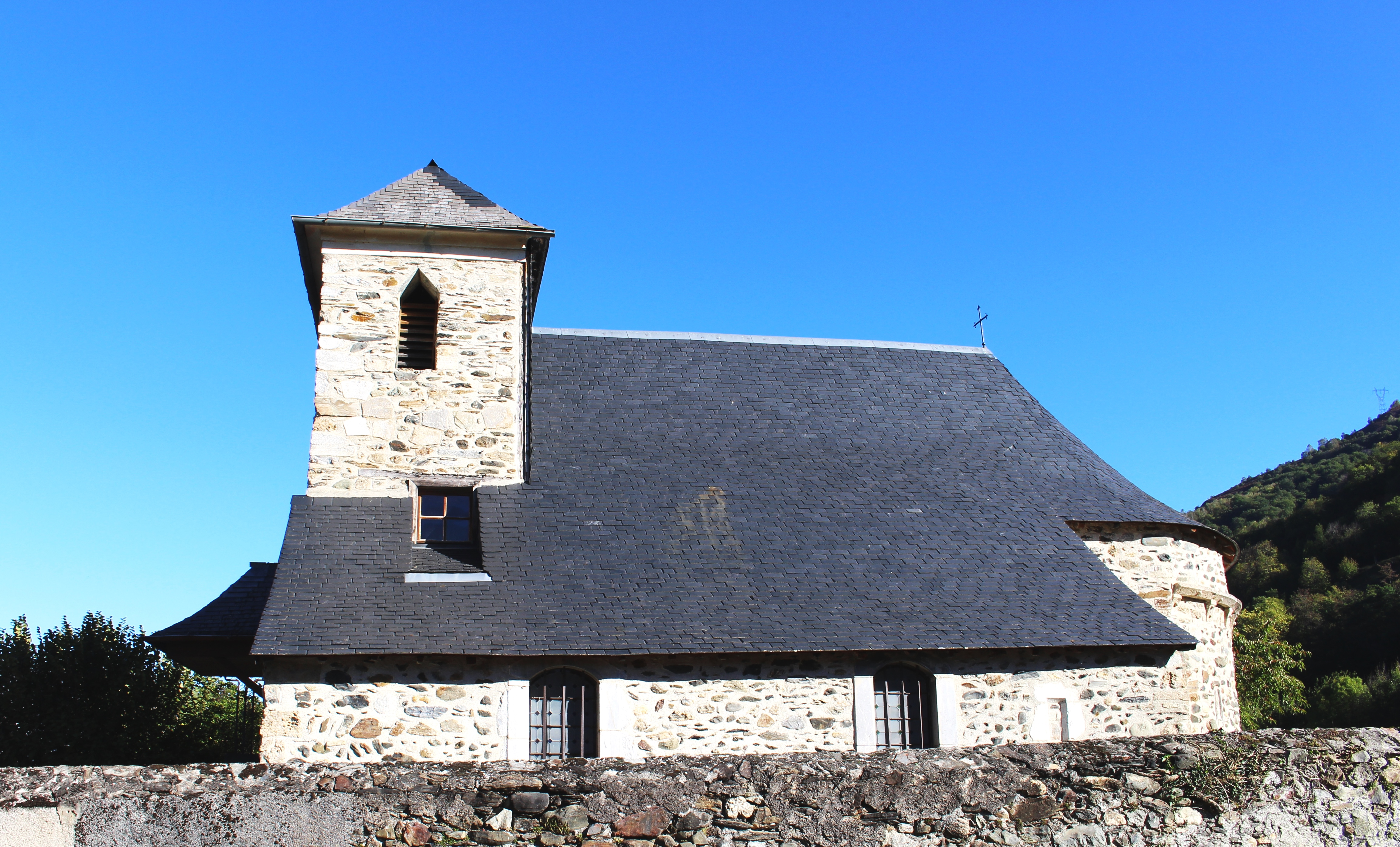 Église Saint-Martin d'Arbouix (Hautes-Pyrénées)